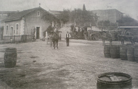 Aigues Vives. En haut la gare